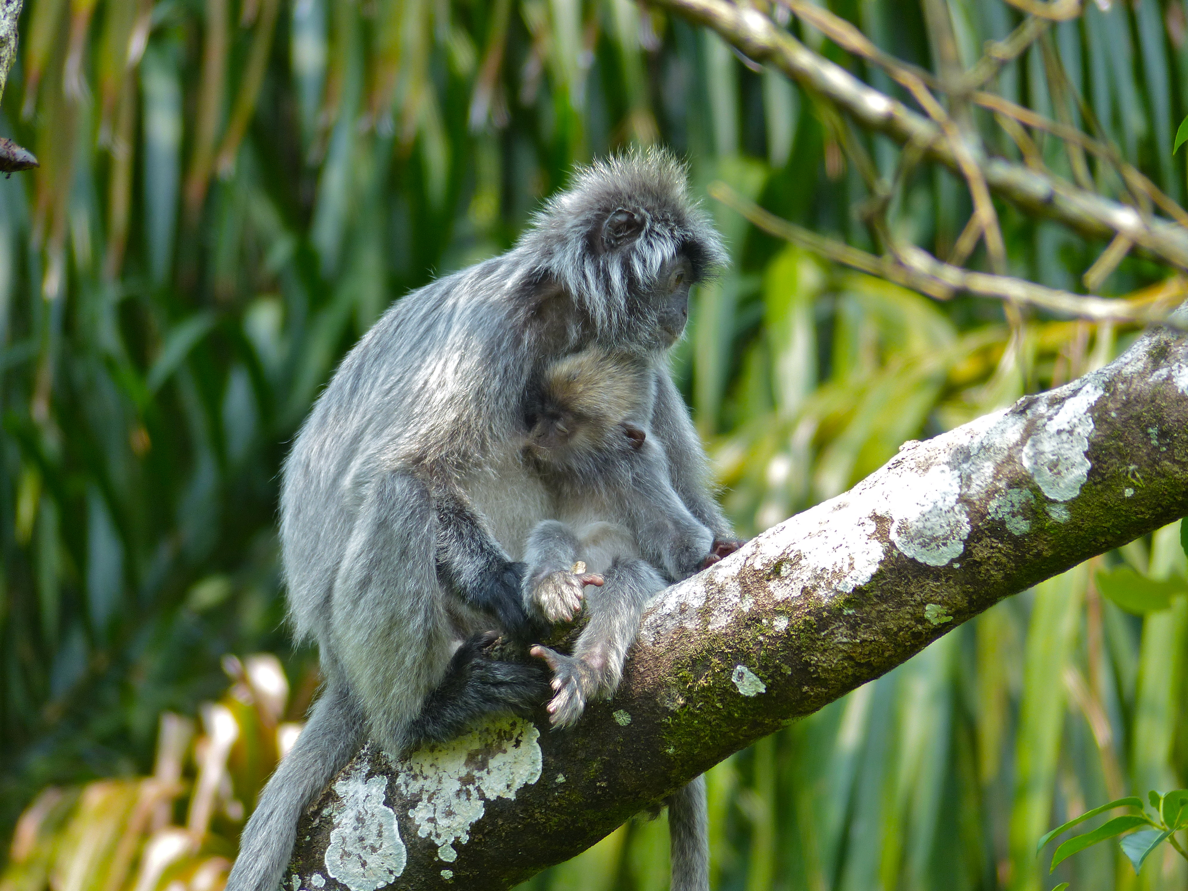 Lintang Trail, Bako NP, Sarawak, MALAYSIA